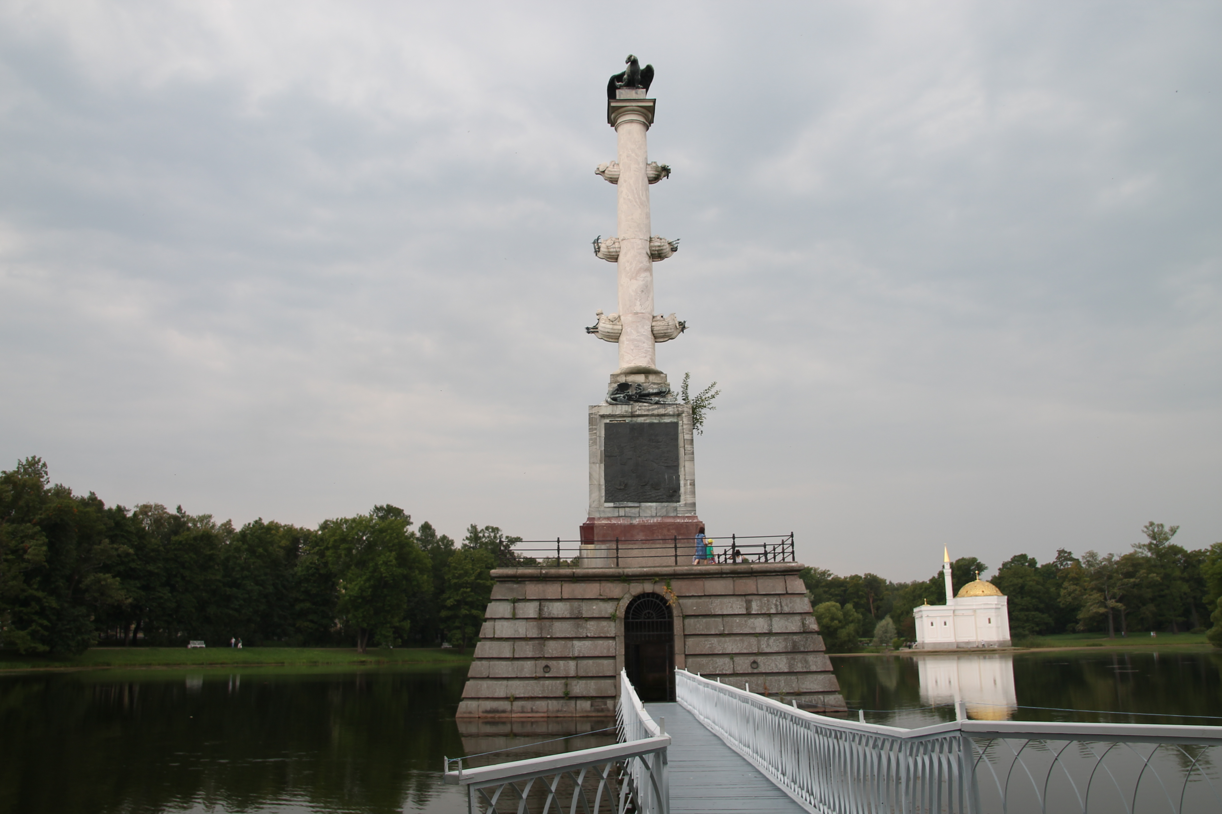 Чесменская (Орловская) колонна: Екатерининский парк, Большой пруд, Пушкин, Пушкинский район, Санкт-Петербург